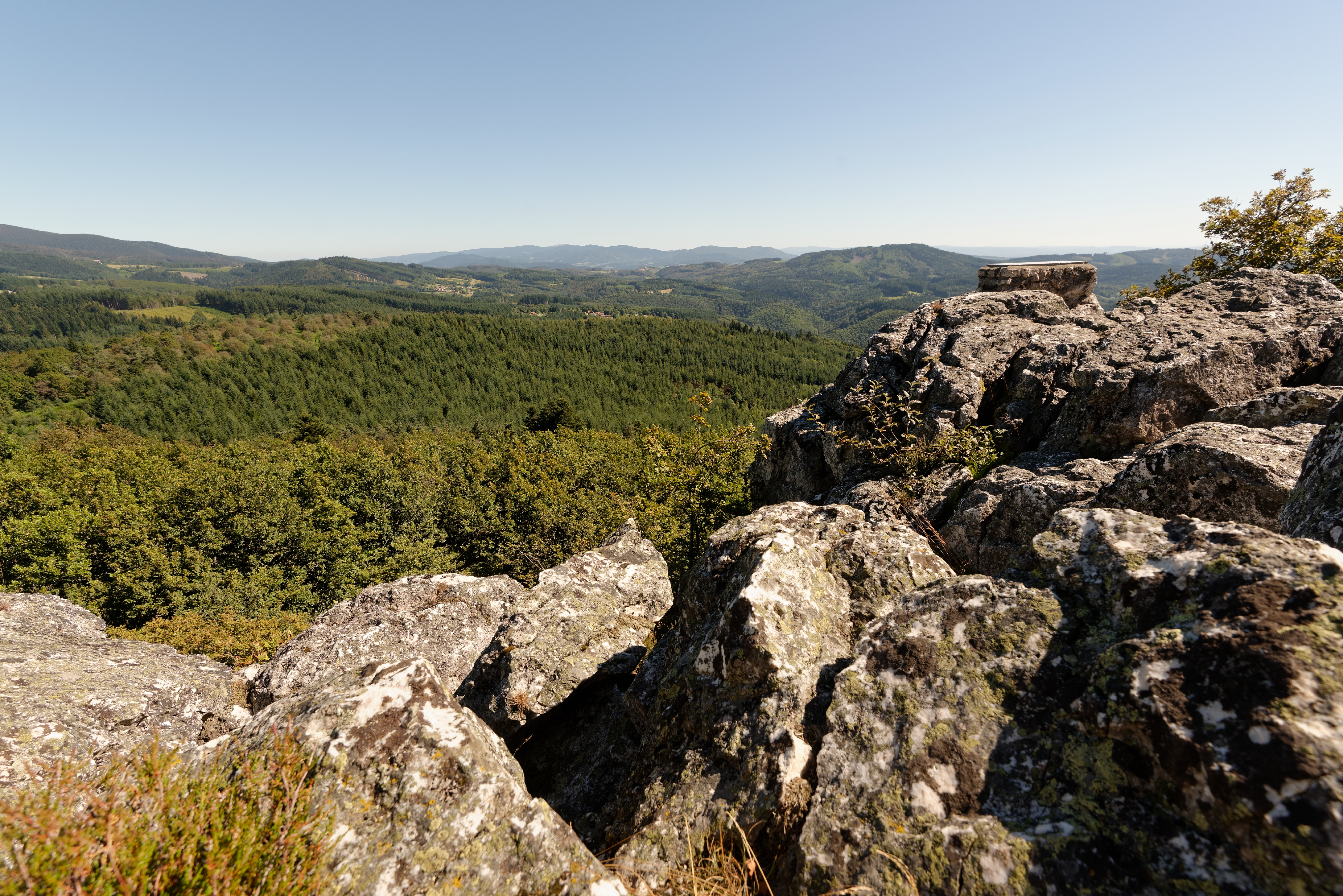 Vue vers le sud depuis le sommet du Rez de Sol, le plus long filon de quartz du Massif Central, situé à 943 m d'altitude dans les Bois noirs.